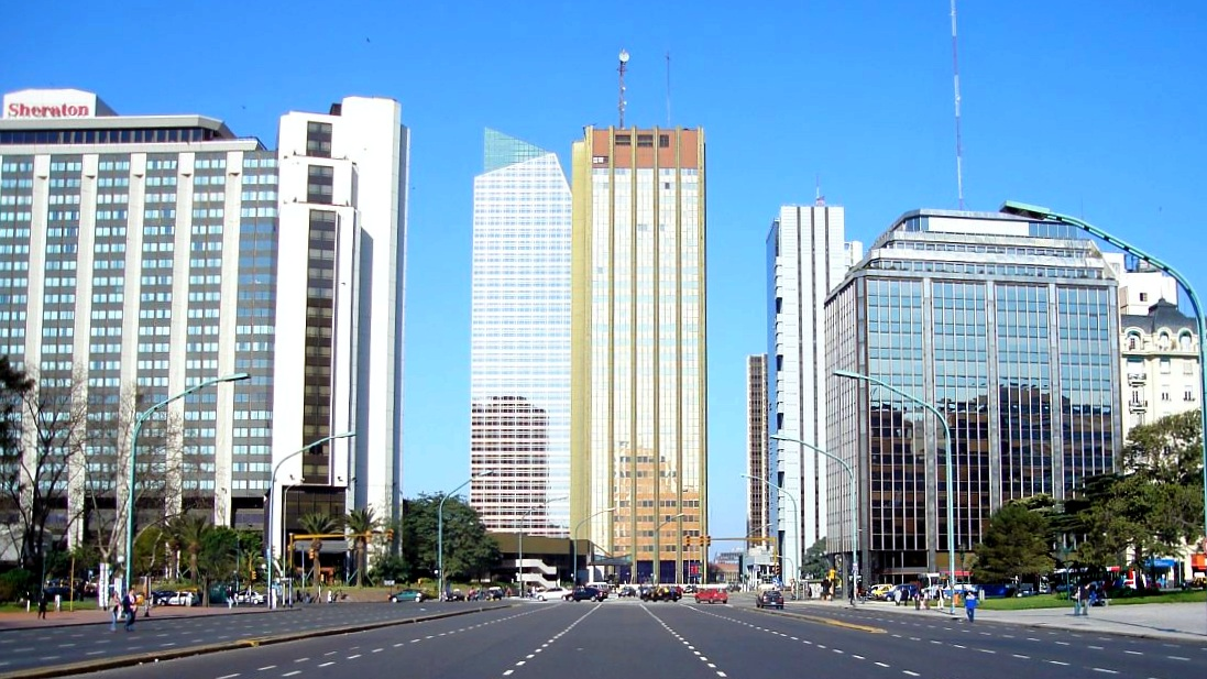 Fin de la Avenida del Libertador, primeros cien metros de la Avenida Leandro N. Alem, barrio de Retiro, Ciudad de Buenos Aires. A la derecha la Plaza San Martín, a la izquierda la Plaza Fuerza Aérea Argentina, al frente Catalinas Norte.